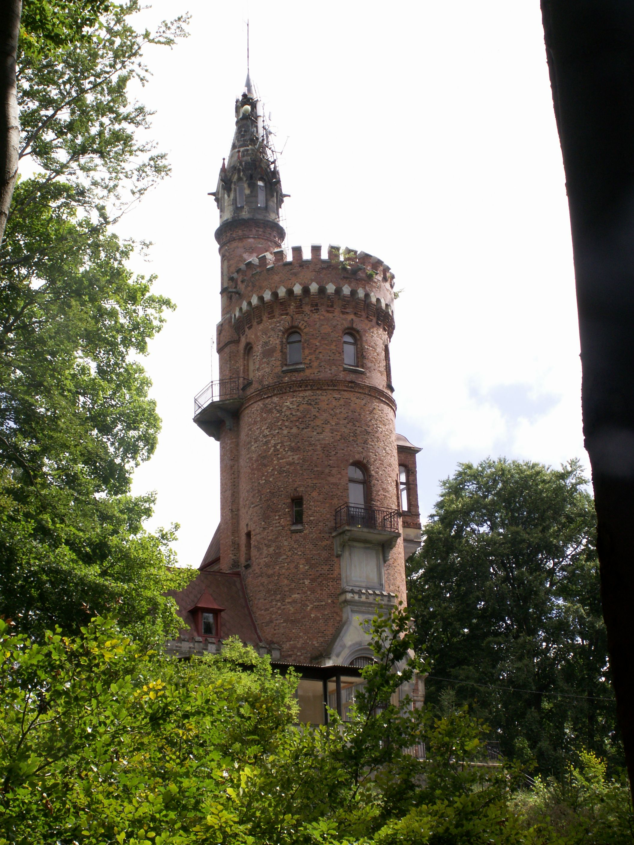 Goethova vyhlídka v Karlových Varech